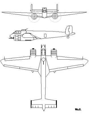 Risszeichung der SM89